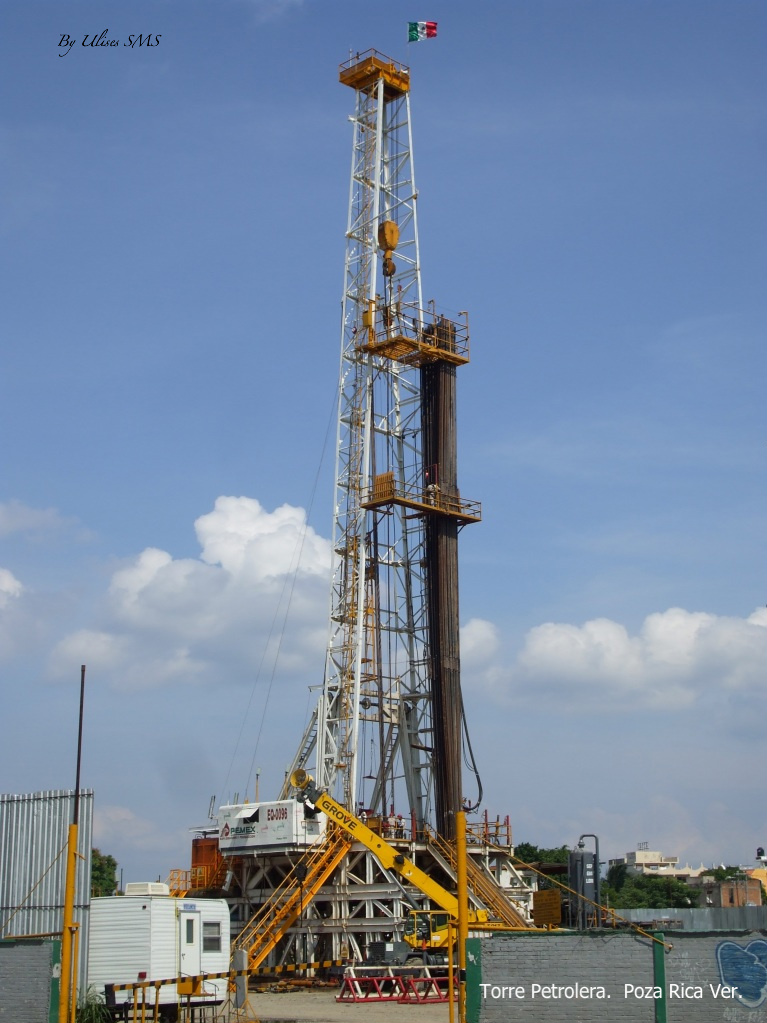 Torre Petrolera Poza Rica